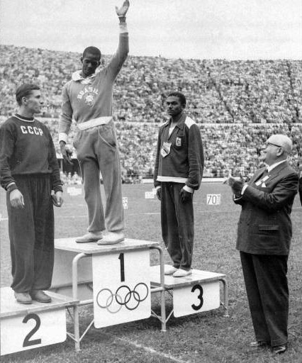 Asnoldo Devonish en el pódium de premiación del salto triple. Medalla de bronce, Helsinki 1952.